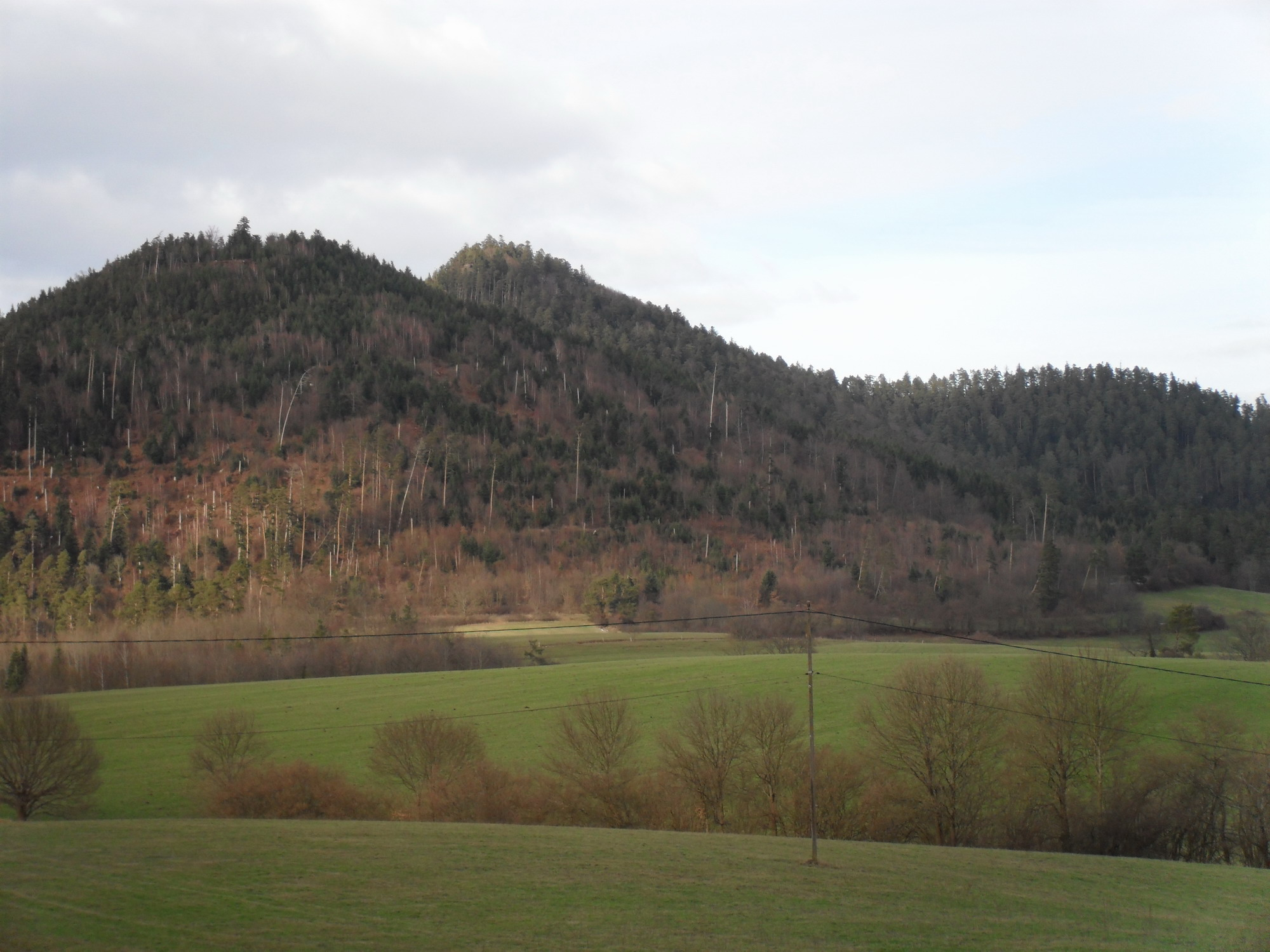 Au second plan Roche des Corbeaux et col du Bon Dieu dominant la Haute vallée du Robache, Saint-Dié